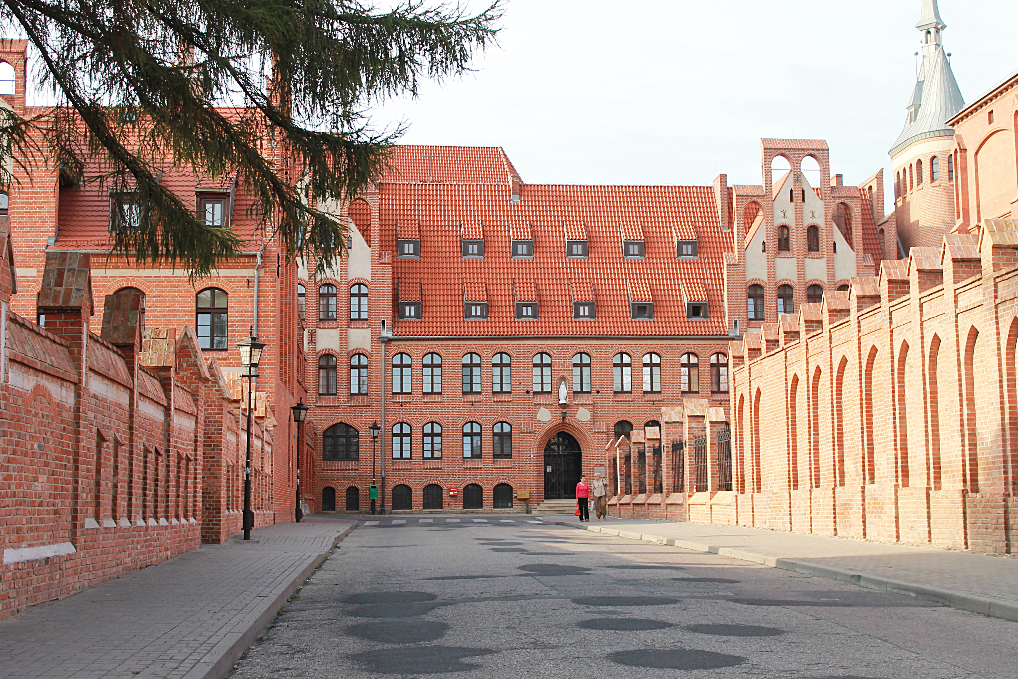 Chełmno, zespół klasztorny benedyktynek, ob. ss. Miłosierdzia św. Wincentego á Paulo